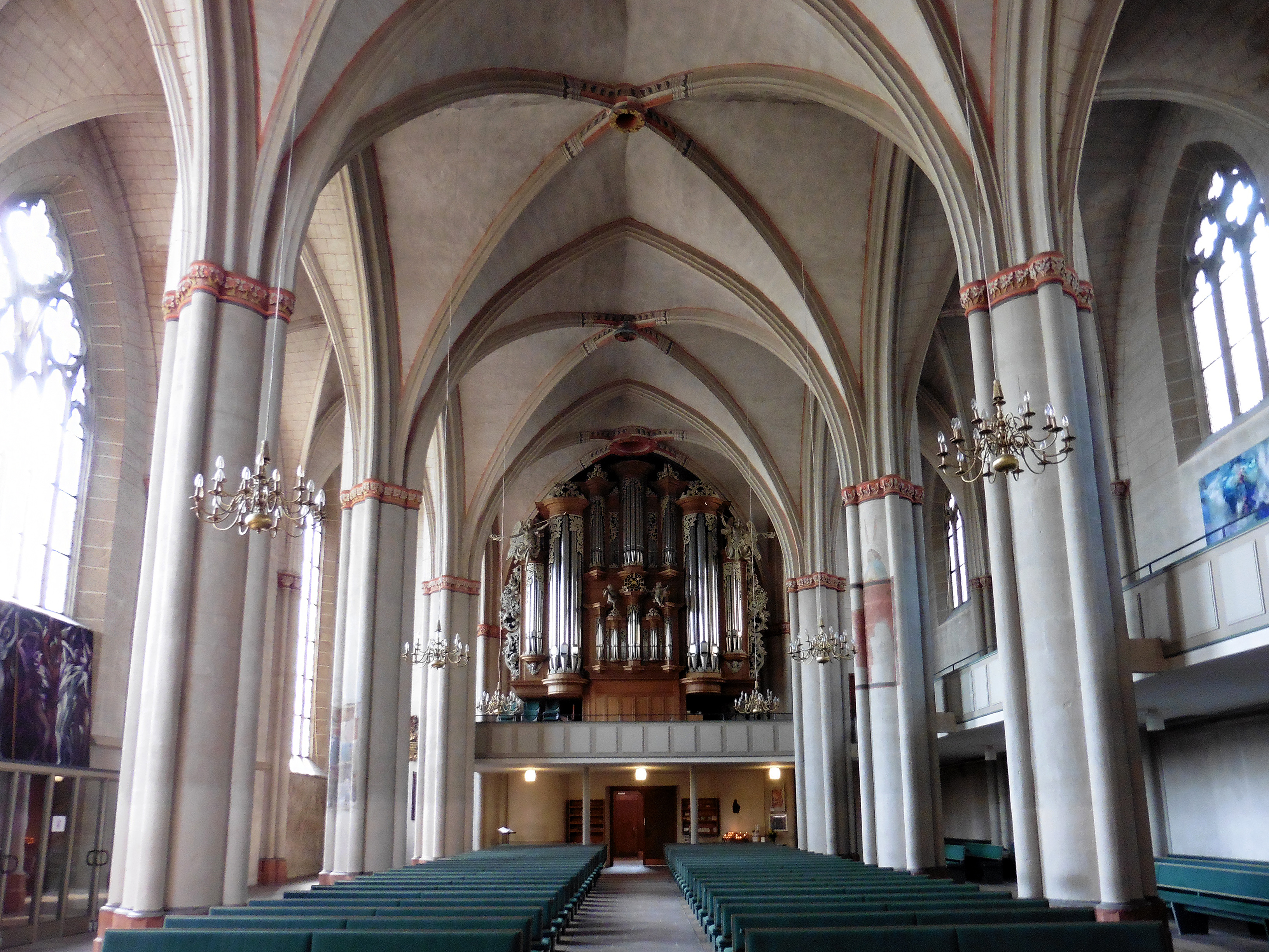 Langhaus der Lutherischen Pfarrkirche in Marburg. Ansicht von Ostnordost.